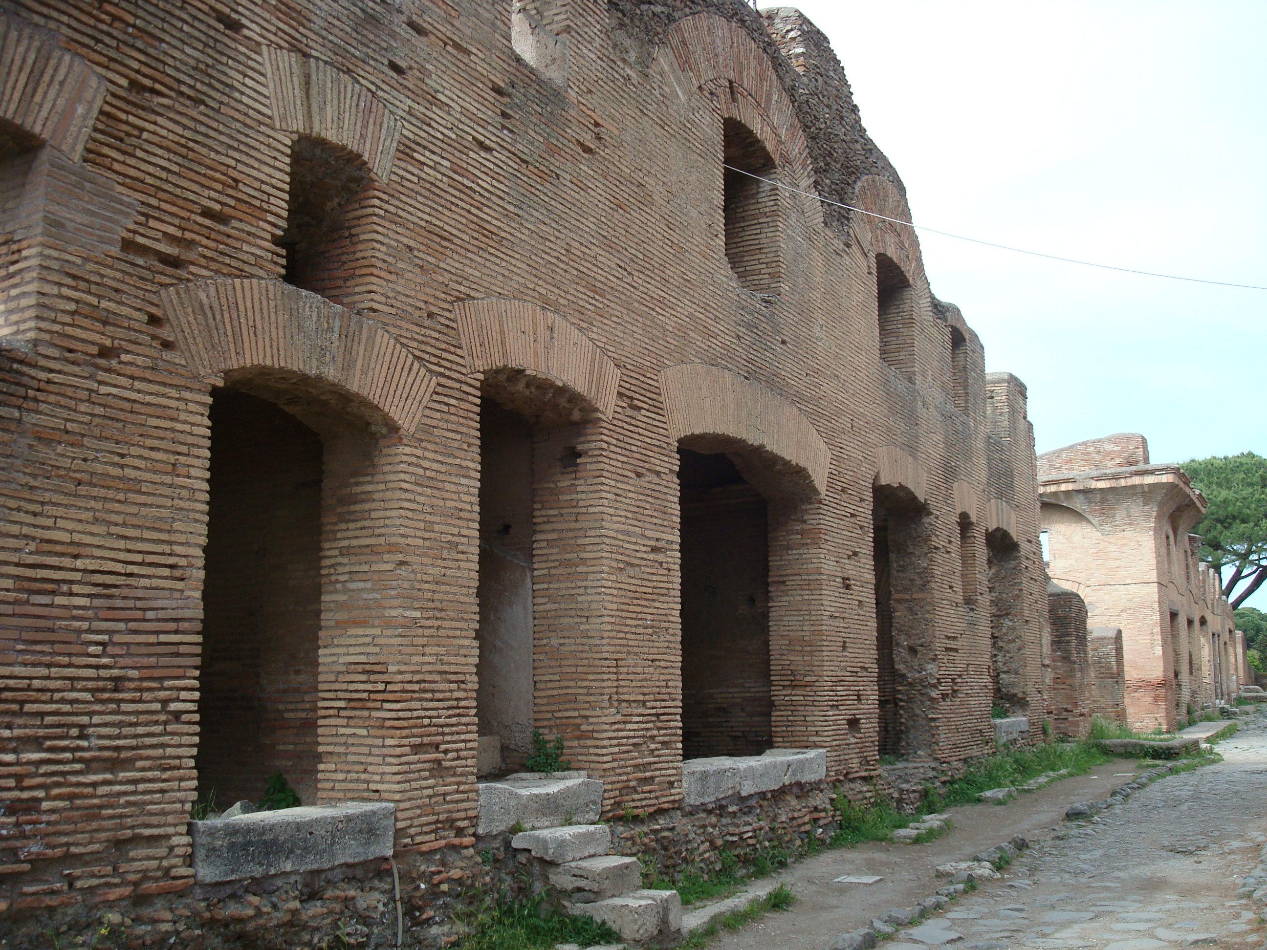 Ostian Insula; Domus di Giove e Ganimede (I,IV,2)